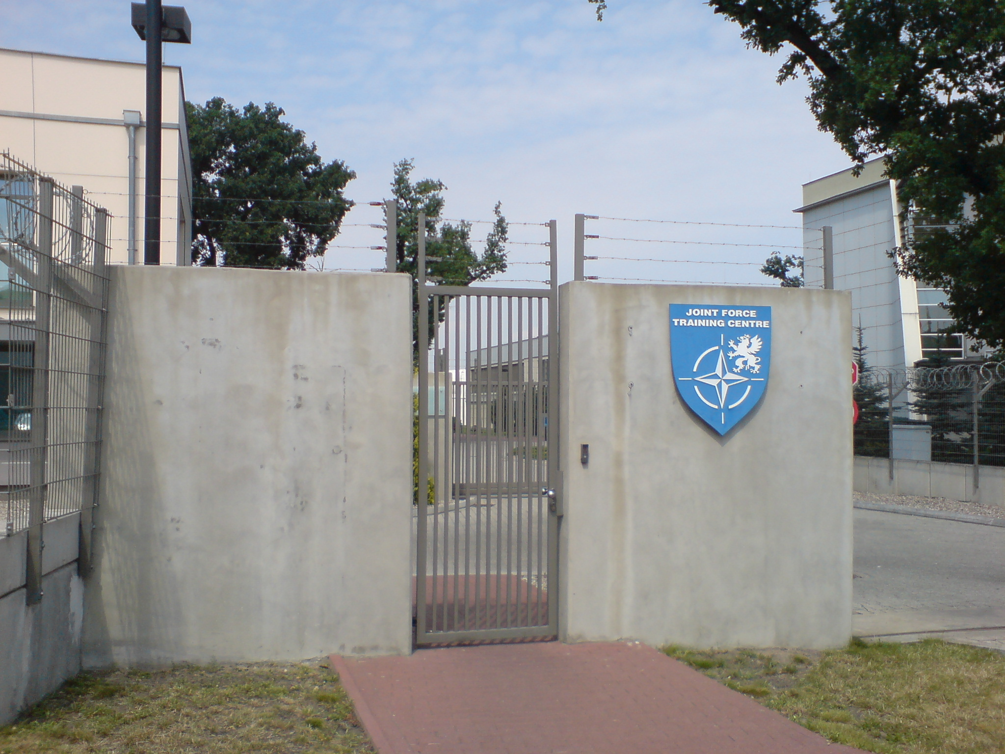 NATO Joint Force Training Center (Centrum Szkolenia Sił Połączonych) - wejście